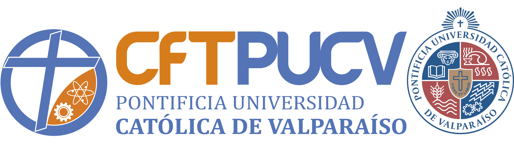 Imagotipo